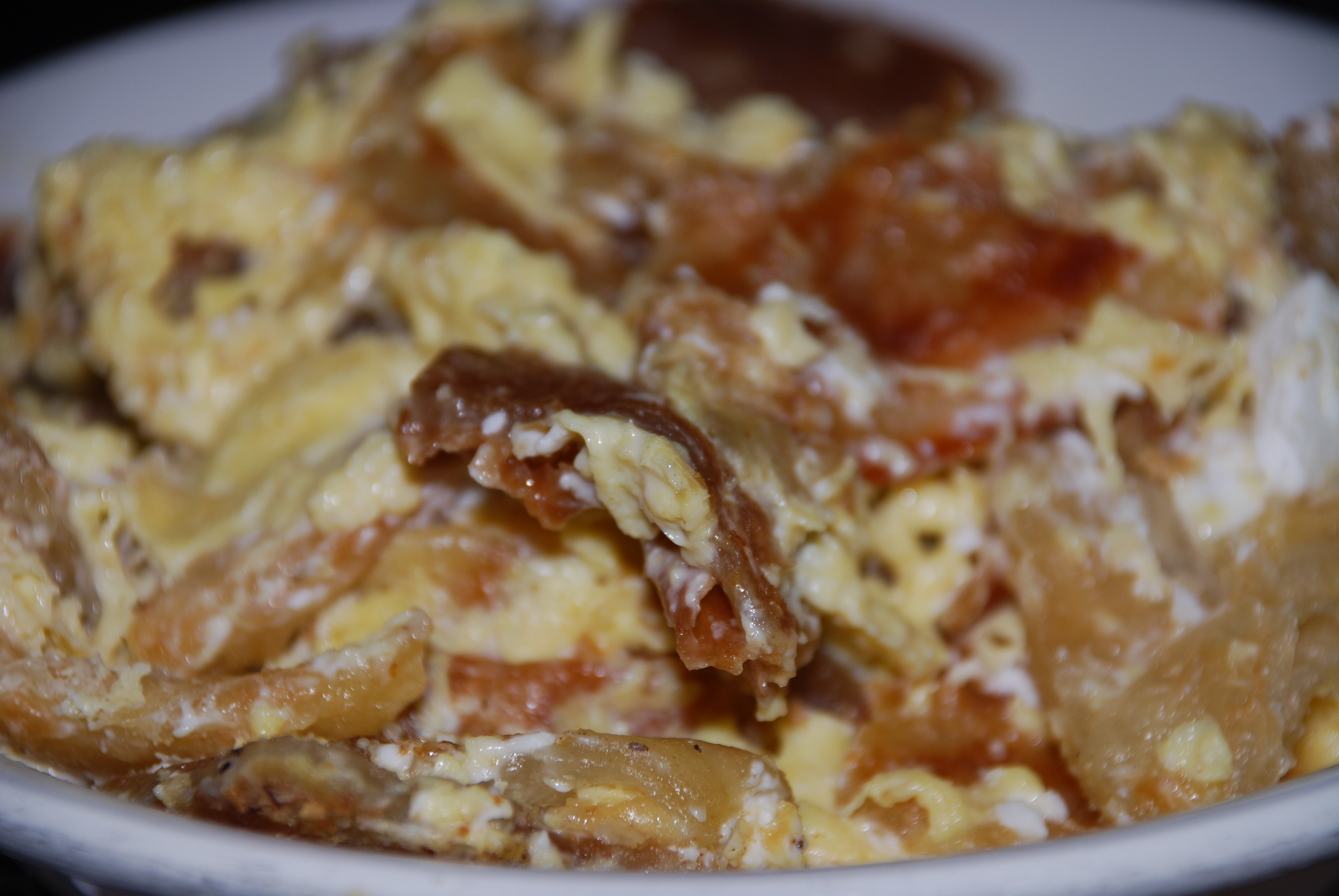 פתות ביצים בנאפיס.